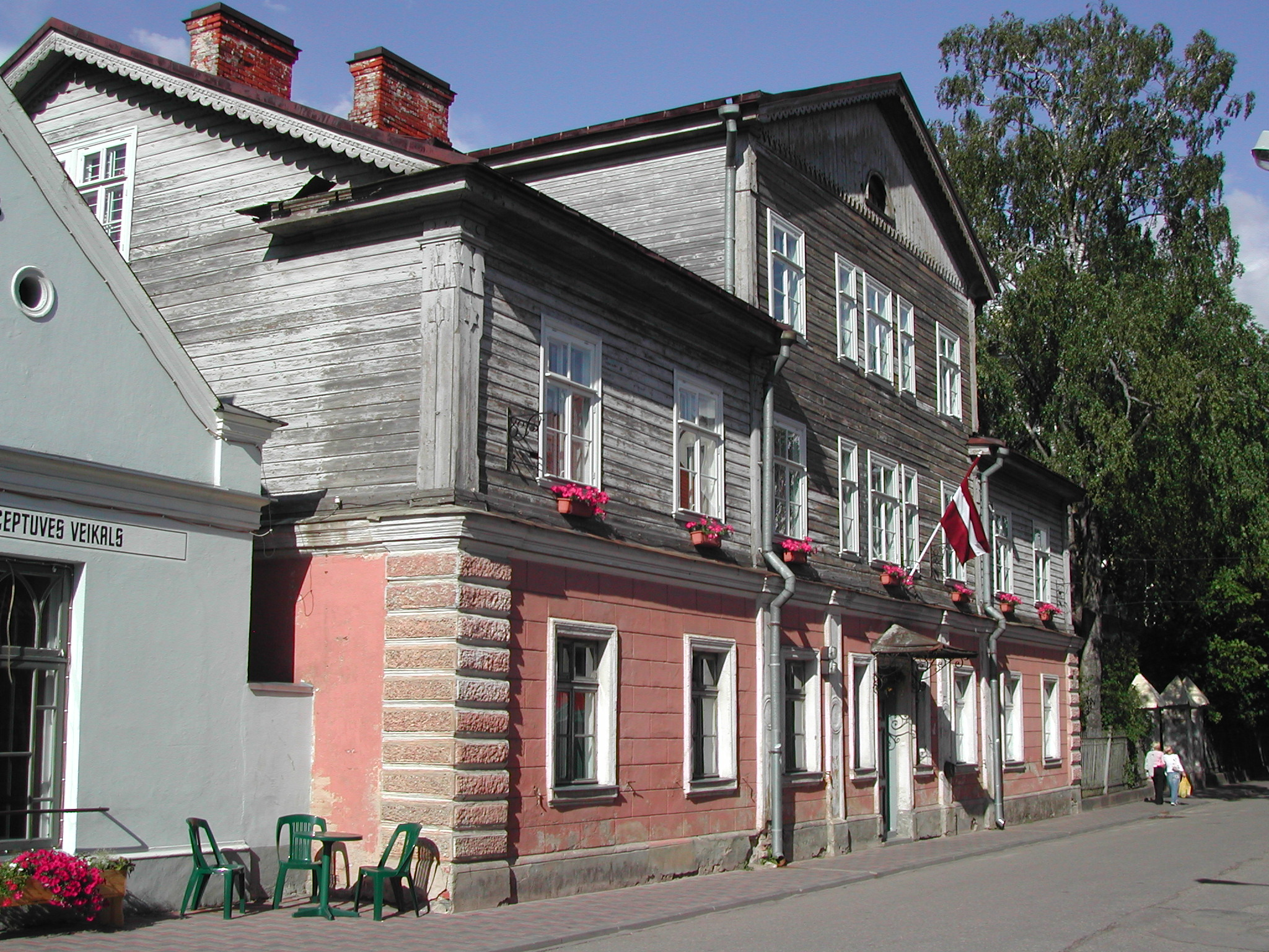 Liepājas iela 33, Kuldīga